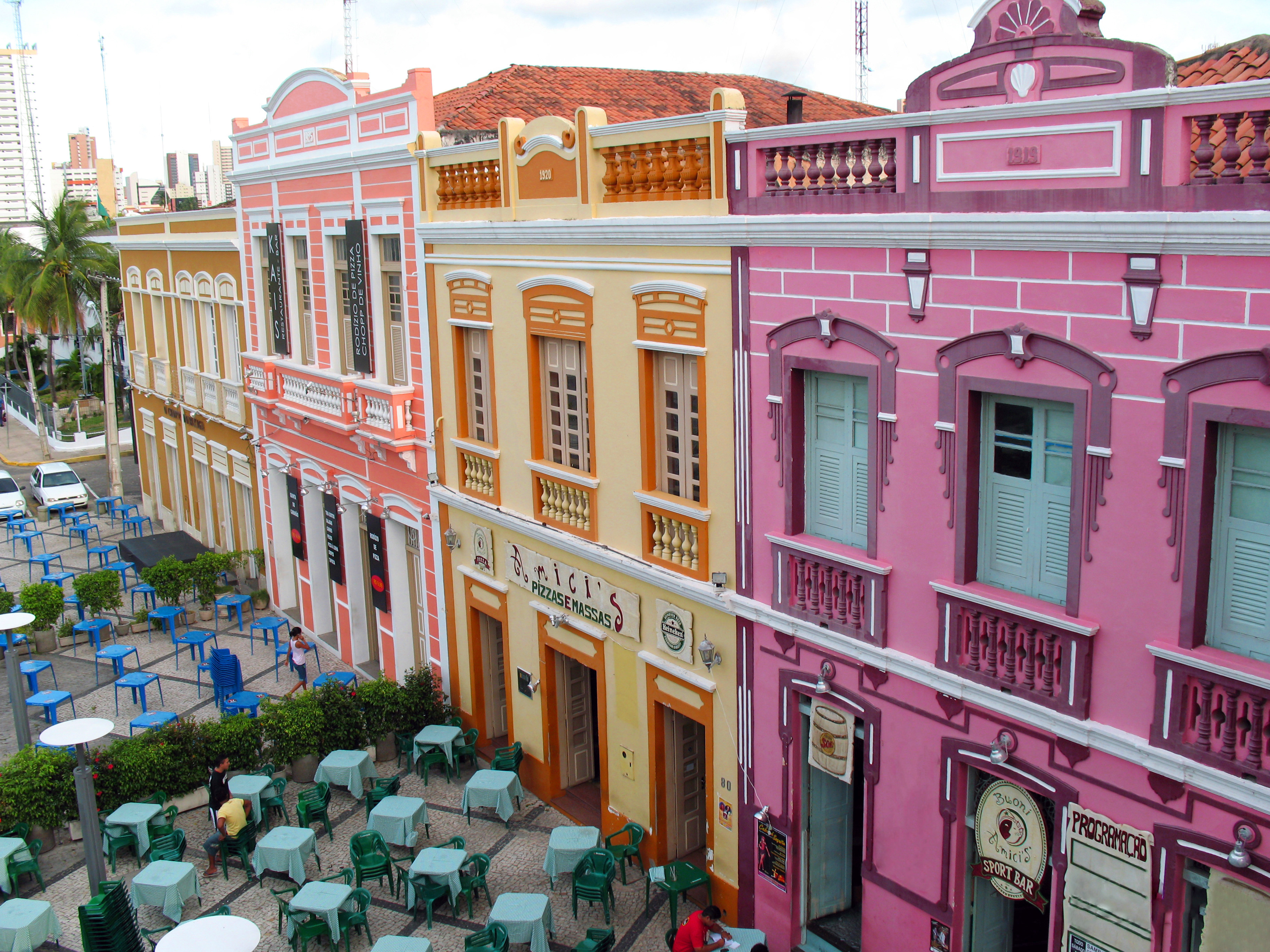 Bares próximos ao Centro Cultural Dração do Mar.